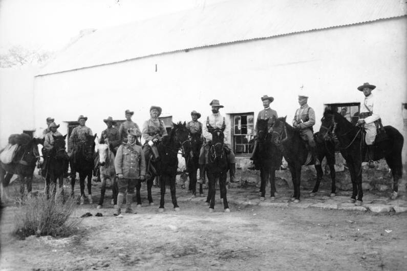 Stab von Estorff in Windhuk